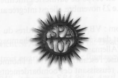 Insigne SPA 102 1916-18